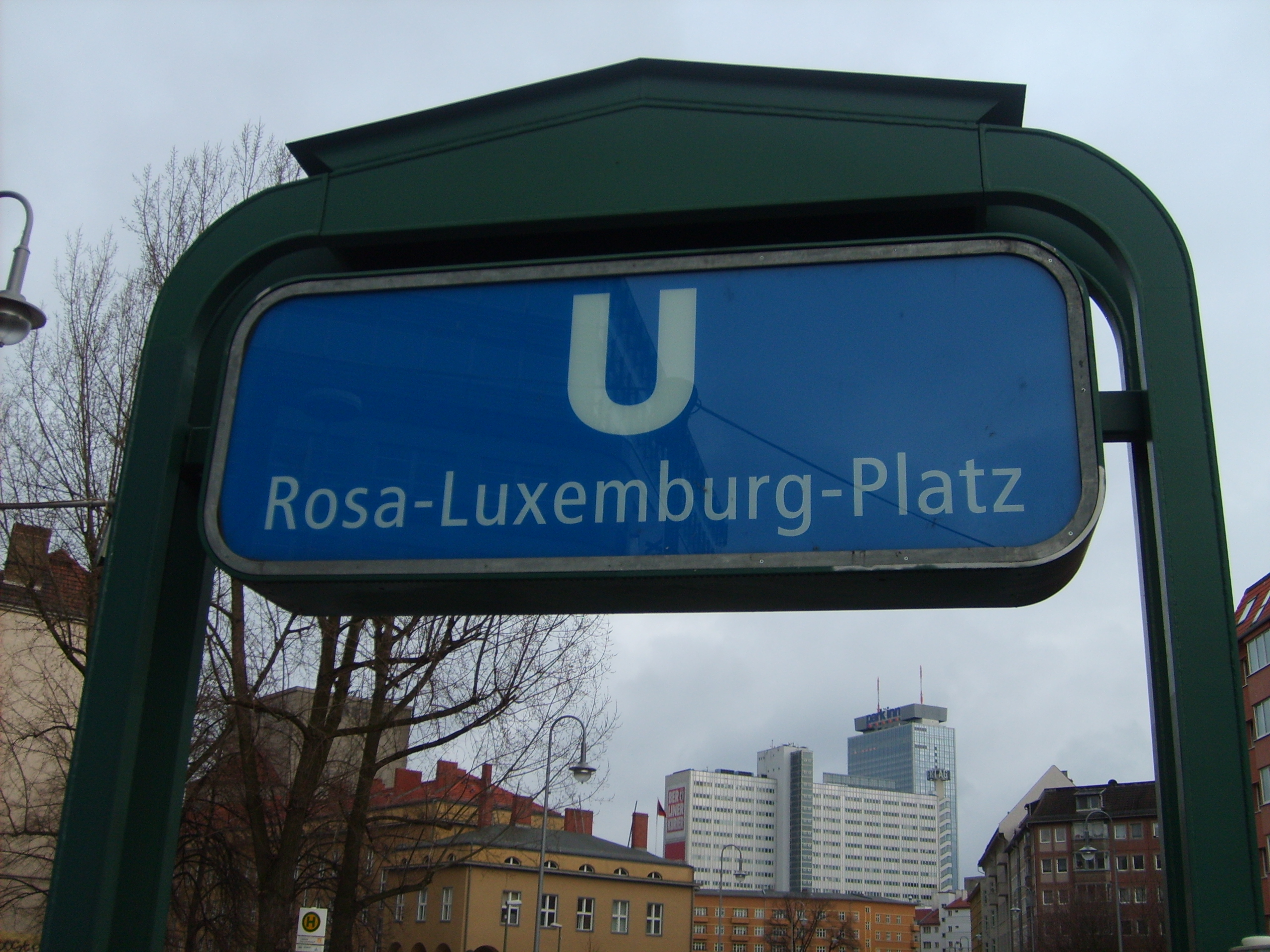 U-Bahnhof Rosa Luxembourg Platz, Berlin, Germany.